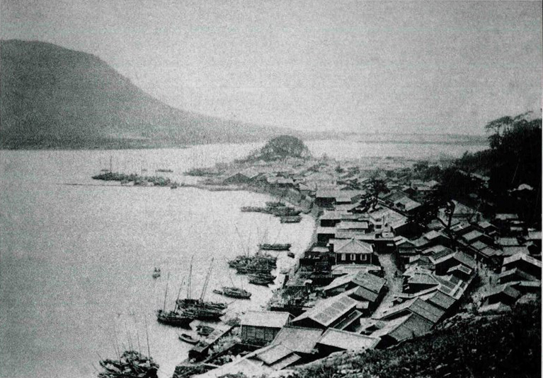 부산항 (1891~1930)